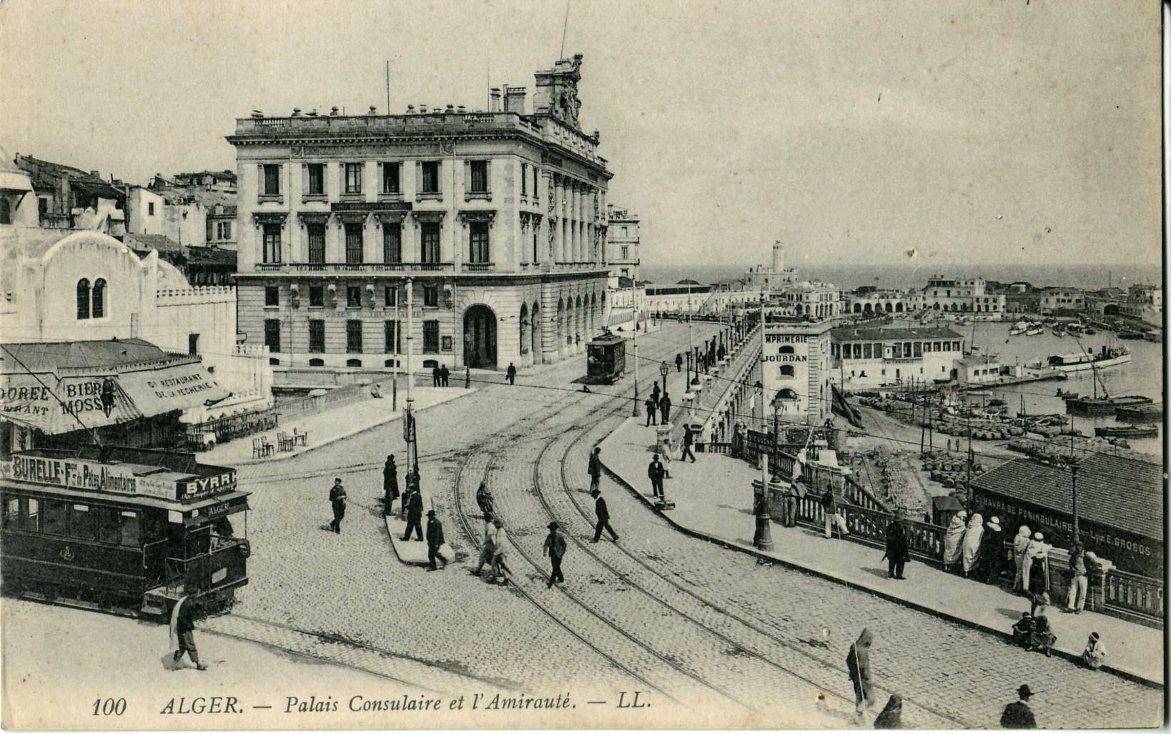 Carte postale ancienne éditée par LL, n°100 : ALGERS - Palais Consulaire et l'Amirautté